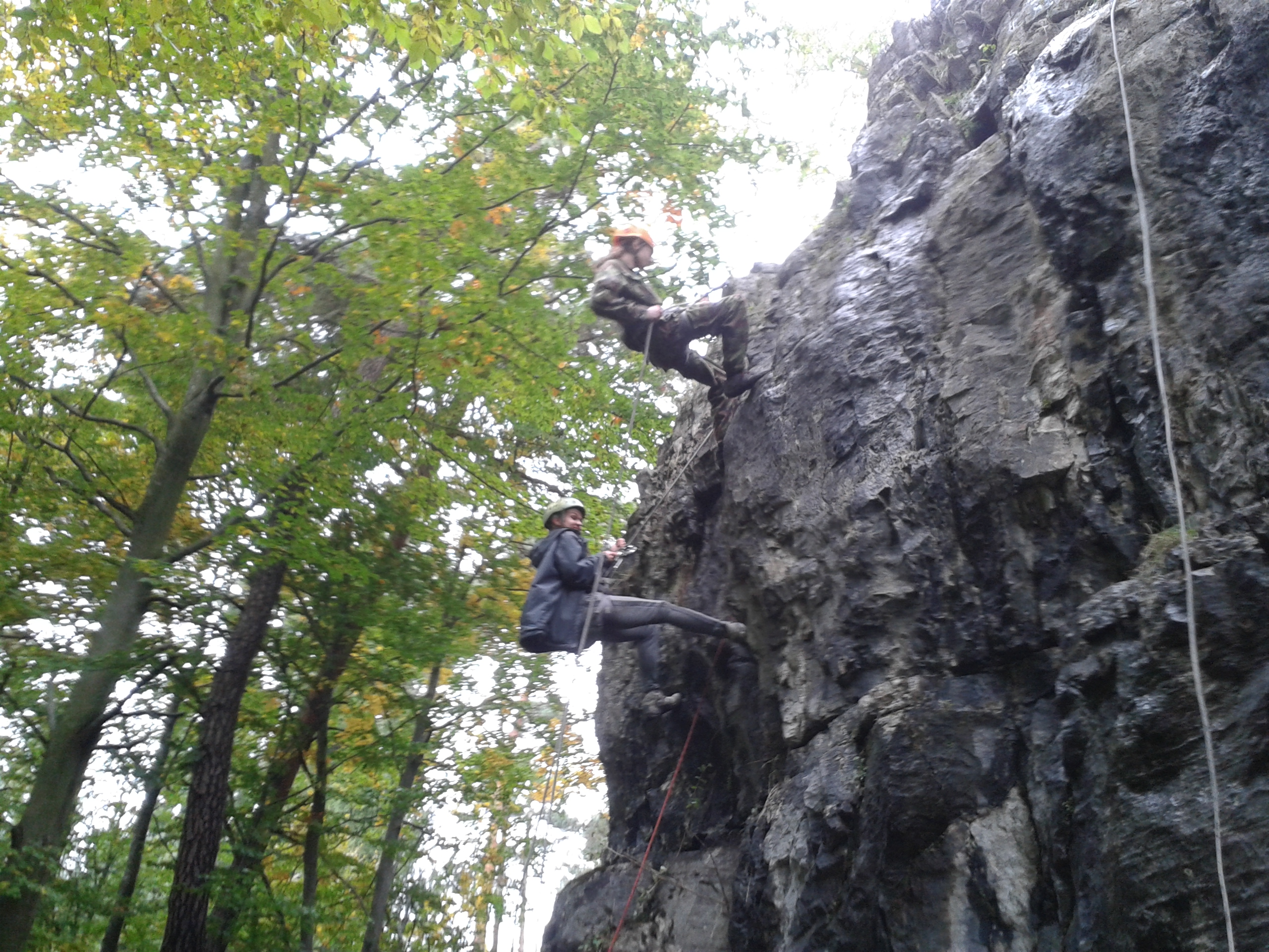 sdfg